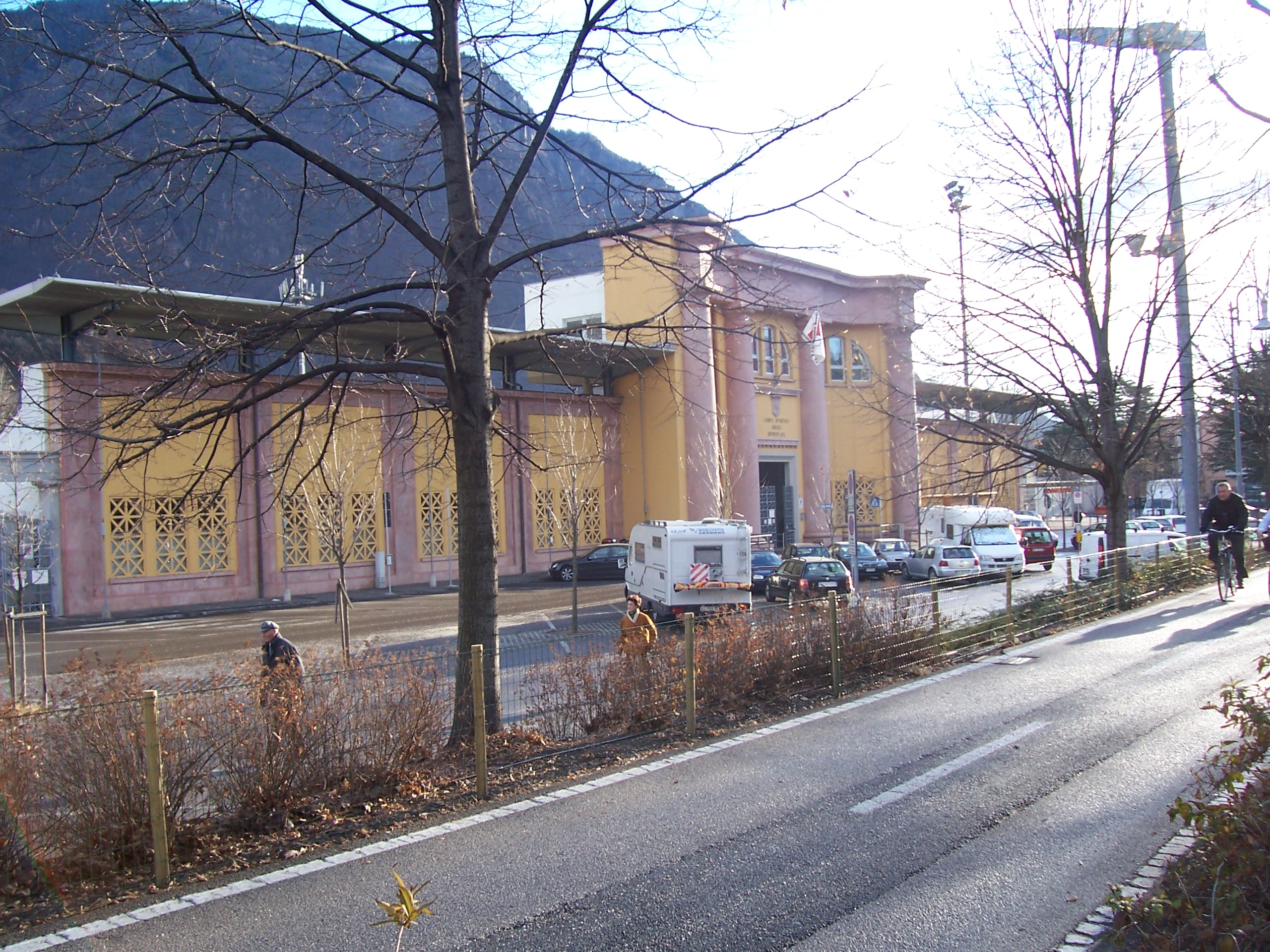 Campo sportivo Druso, Bolzano / Sportplatz Druso, Bozen